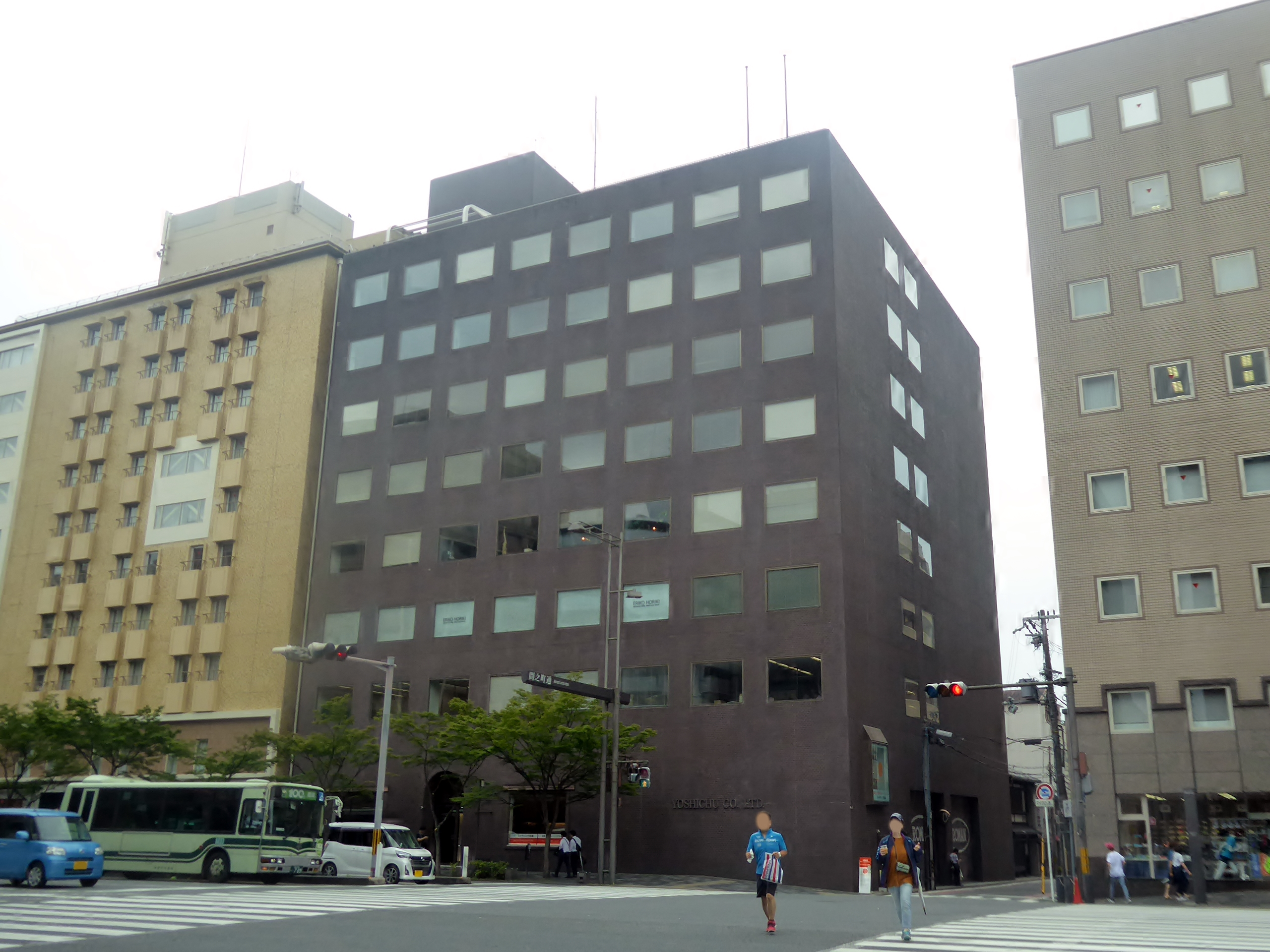 吉忠株式会社本社を撮影。